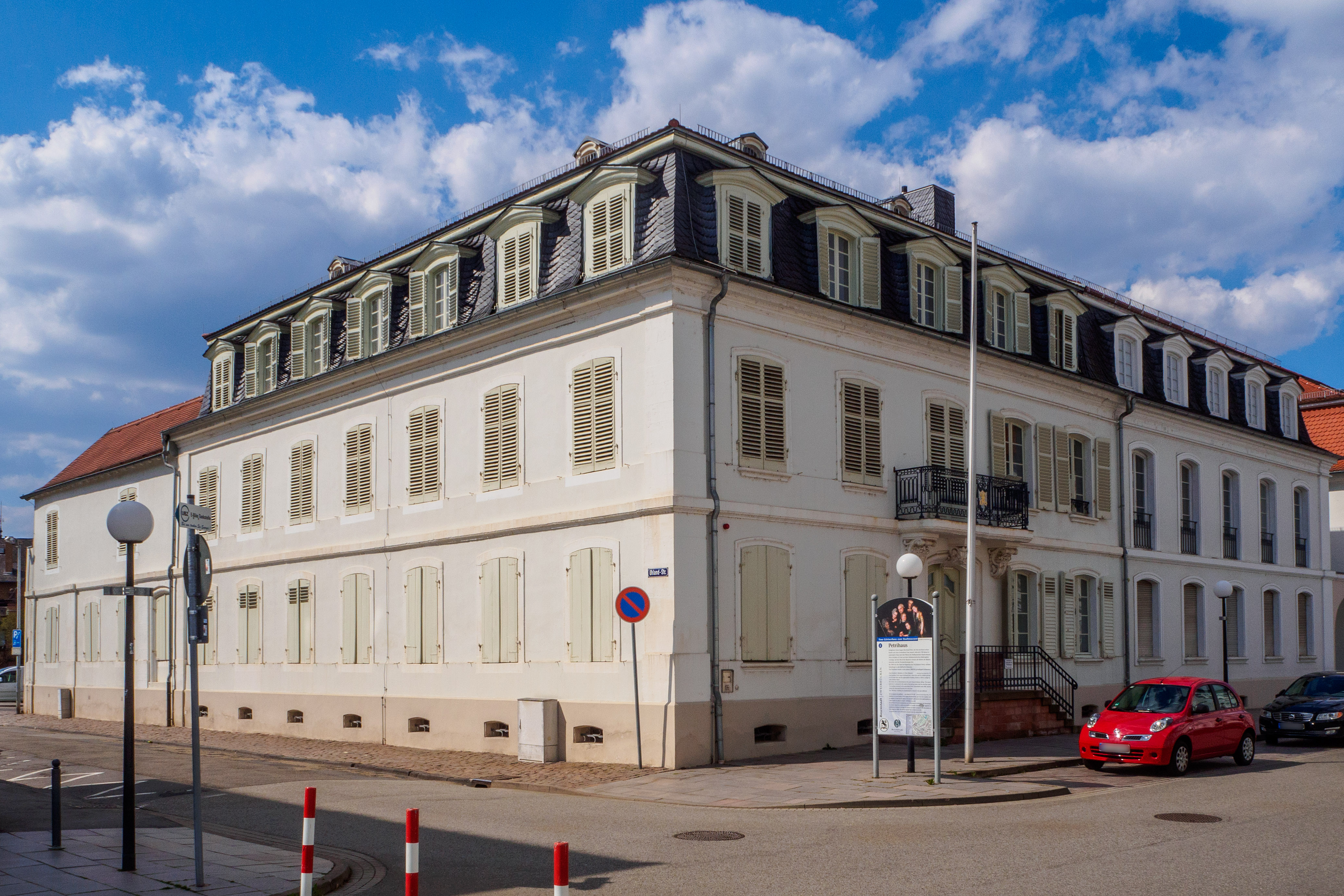 Petrihaus in Zweibrücken, Herzogstraße 9. Sitz von Stadtmuseum und Stadtbücherei